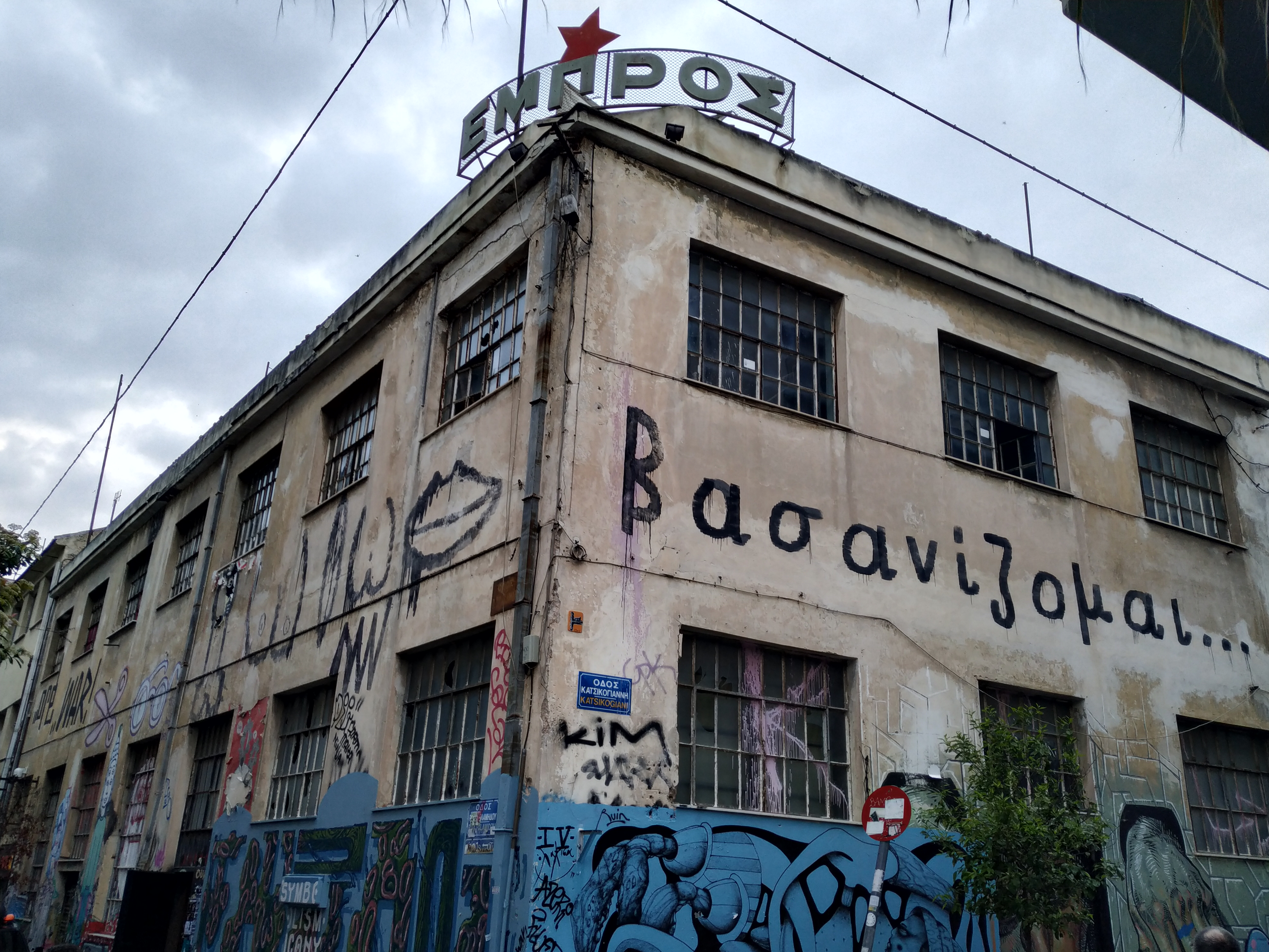 Πρόσοψη κτηρίου